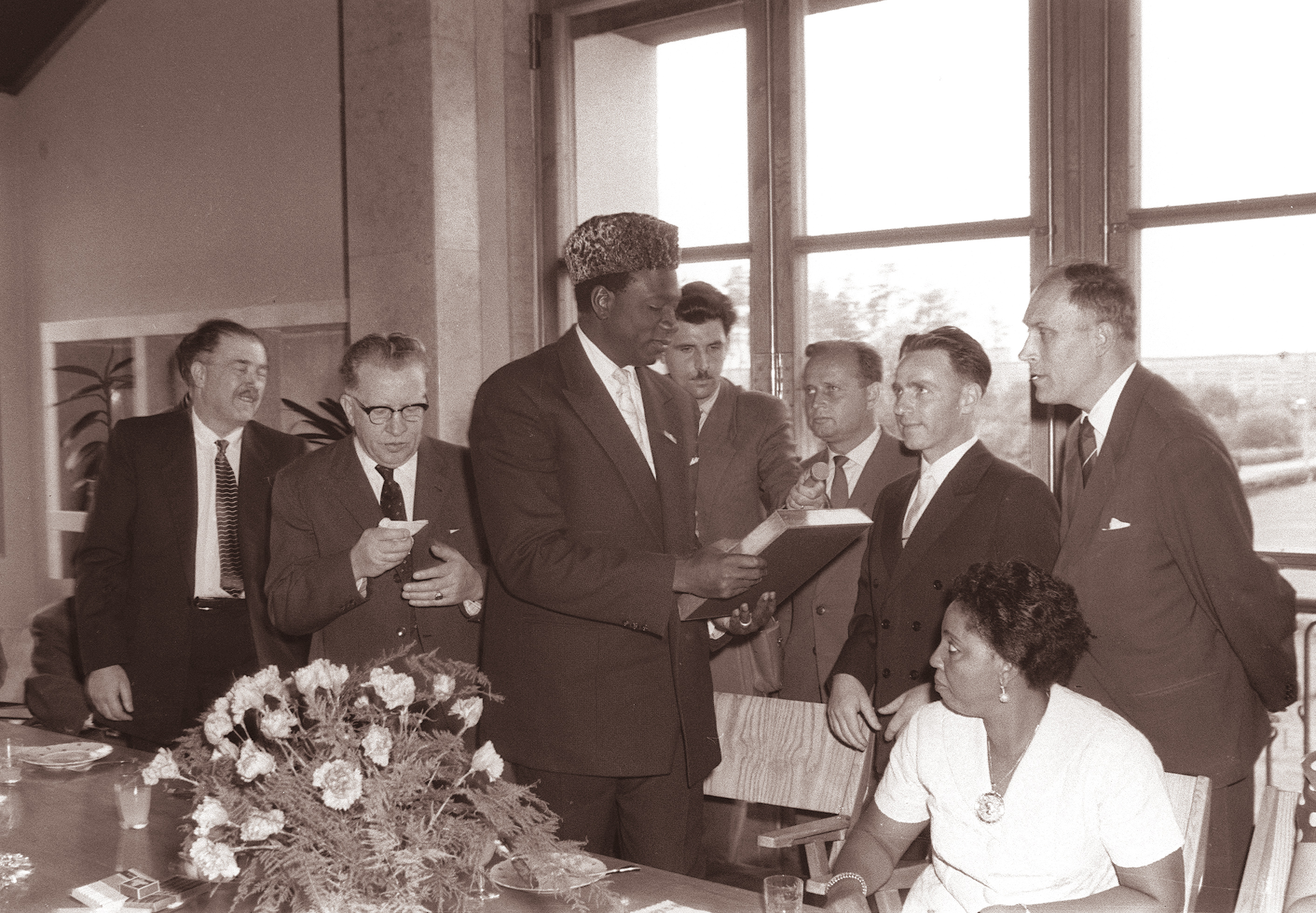 Predsednik republike Mali Modibo Keita s spremstvom v tovarni glinice in aluminija Boris Kidrič v Kidričevem